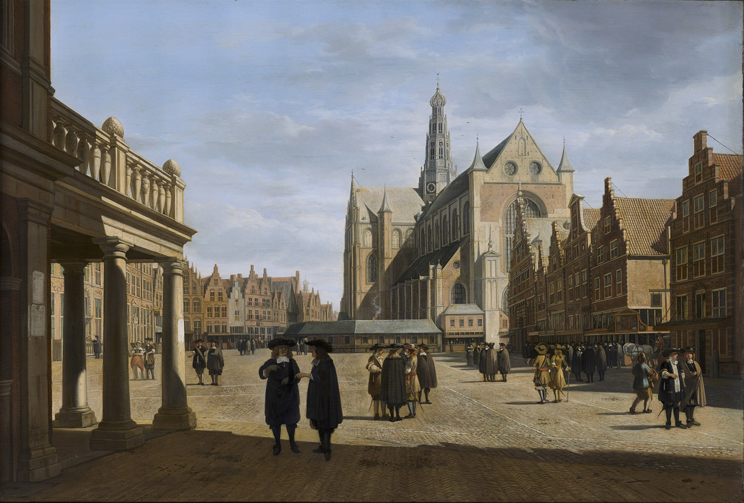 Le Grand marché à Haarlemlabel QS:Lfr,"Le Grand marché à Haarlem"label QS:Lde,"der große Markt in Haarlem"